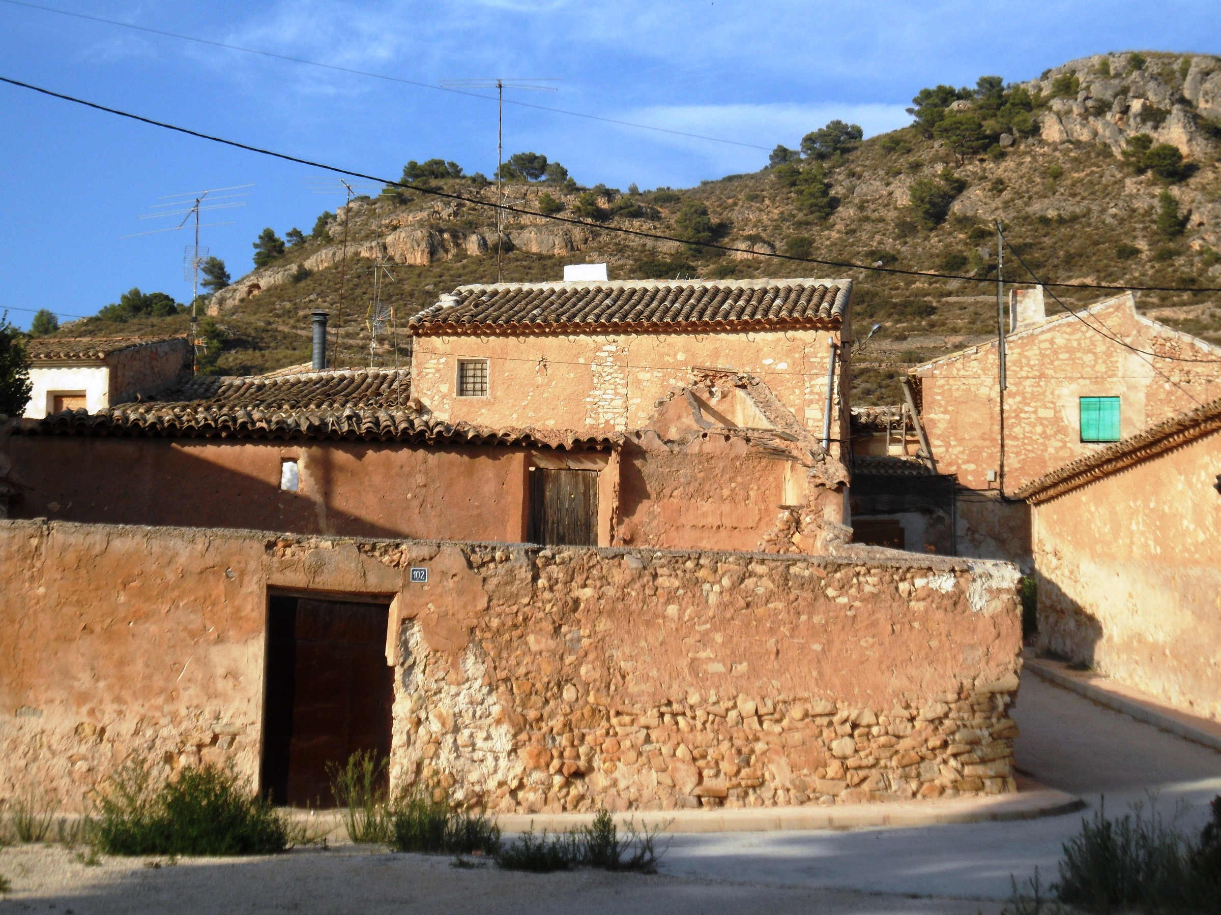 Barri nord de les Enzebres.